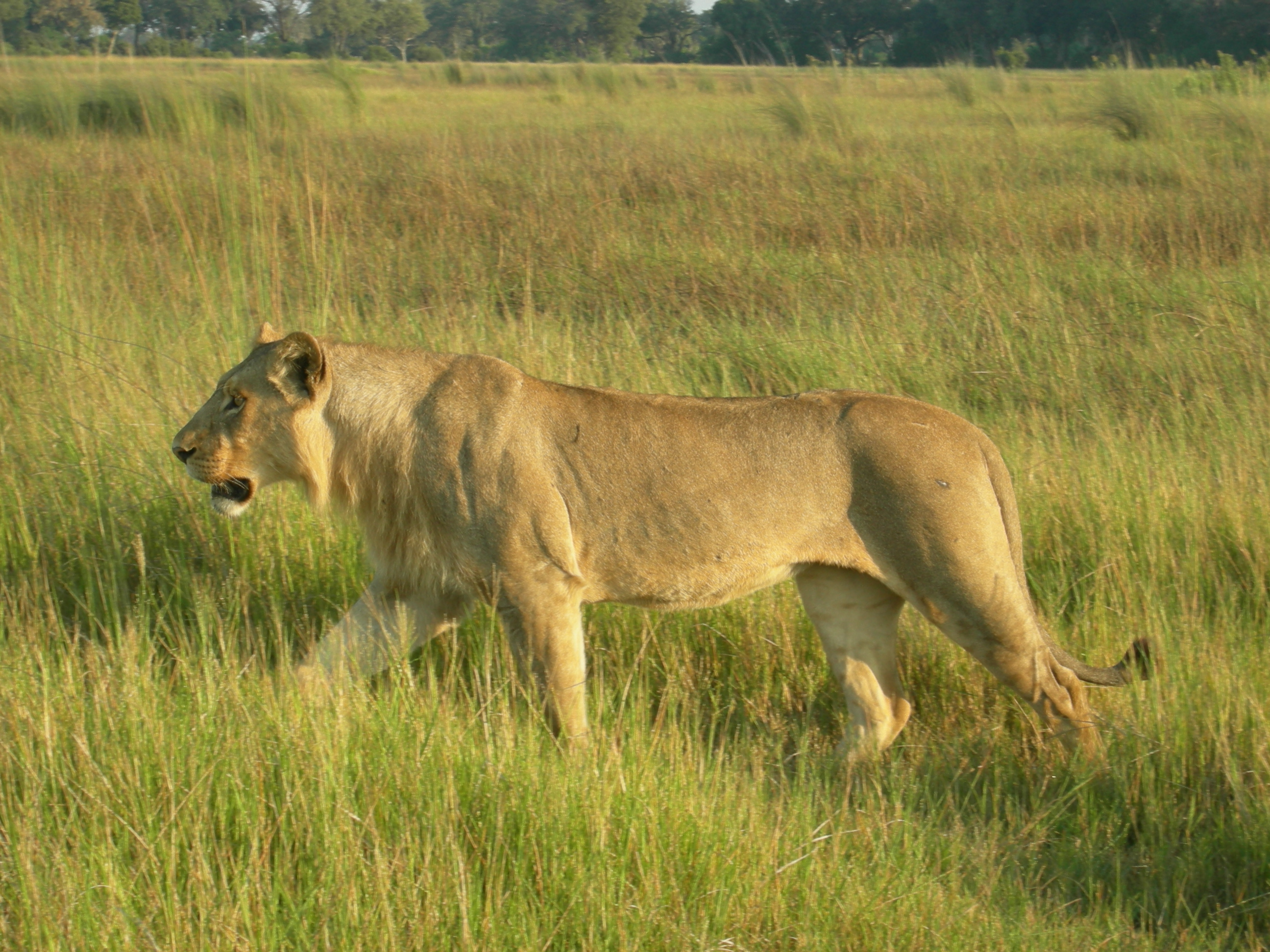 Okavango Delta, Botswana